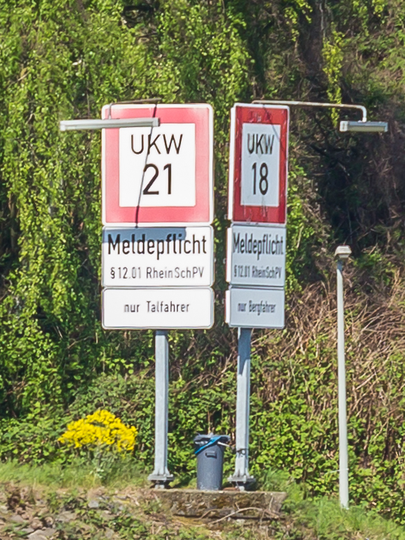 Zwei Schifffahrtszeichen „B.11b Gebot Sprechfunk auf dem angegebenen Kanal zu benutzen“, unterschieden nach Tal- und Bergfahrt, mit Hinweis auf die Meldepflicht nach § 10.01 RheinSchPV